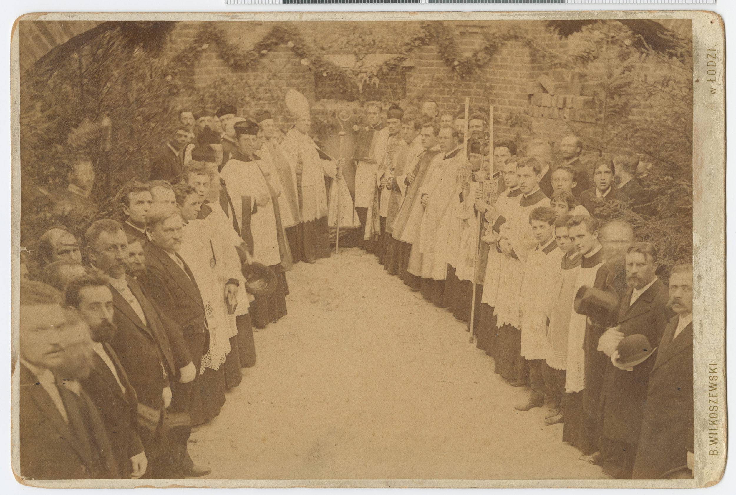 Fotografia Bronisława Wilkoszewskiego przedstawiająca poświęcenie fundamentów kościoła pw. Wniebowzięcia Najświętszej Marii Panny w Łodzi mieszczącym się na Placu Kościelnym. Decyzję o budowie nowej świątyni podjęto w latach 80. XIX wieku a projekt w stylu neogotyckim (a dokładniej tzw. „gotyk bałtycko-wiślany”) wykonał warszawski architekt Konstanty Wojciechowski. Budowa rozpoczęła się w 1888 r. by już w dwa lata później świątynia była gotowa w stanie surowym. Wykończenia trwały do 1897 r. i dopiero w tym roku dokonano jego konsekracji. Na fotografii znajduje się prawdopodobnie arcybiskup warszawski Teofil Chościak-Popiel, który poświęcił kamień węgielny w otoczeniu innych przedstawicieli stanu kapłańskiego (wśród których zapewne znajduje się również ówczesny proboszcz odpowiedzialny za budowę nowej świątyni ks. Jan Siemiec) wraz z asystą ministrantów oraz osobami świeckimi. Gałązki widoczne na fotografii mogły stanowić przy poświęcaniu symbol powstawania czegoś nowego – jak zazieleniające się pędy na wiosnę. Jednocześnie ich obecność wskazywać może, że zdjęcie wykonano z okazji zakończenia stawiania krokwi.